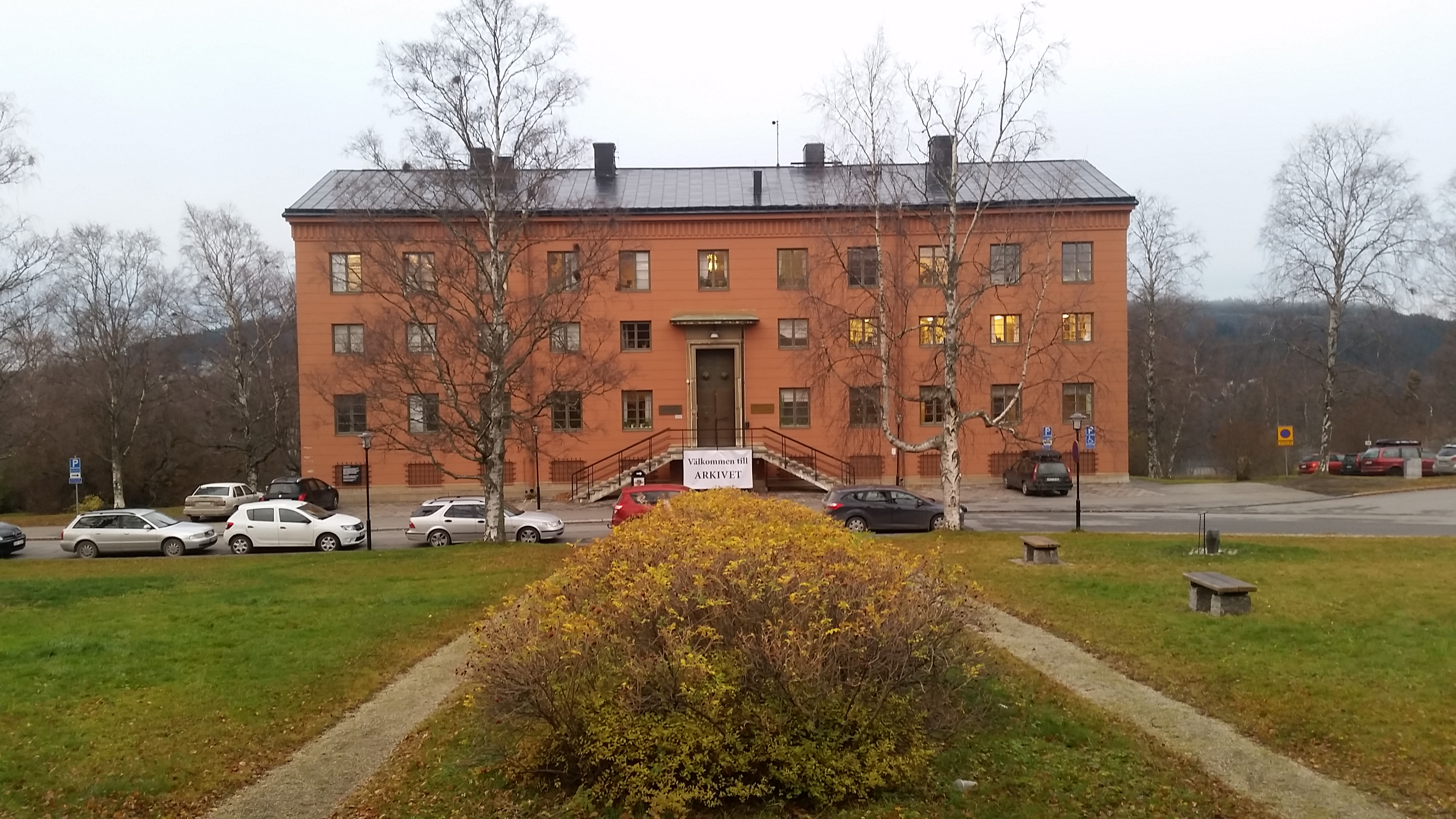 Framsidan av Landsarkivet i Östersund med Museiplan i förgrunden.